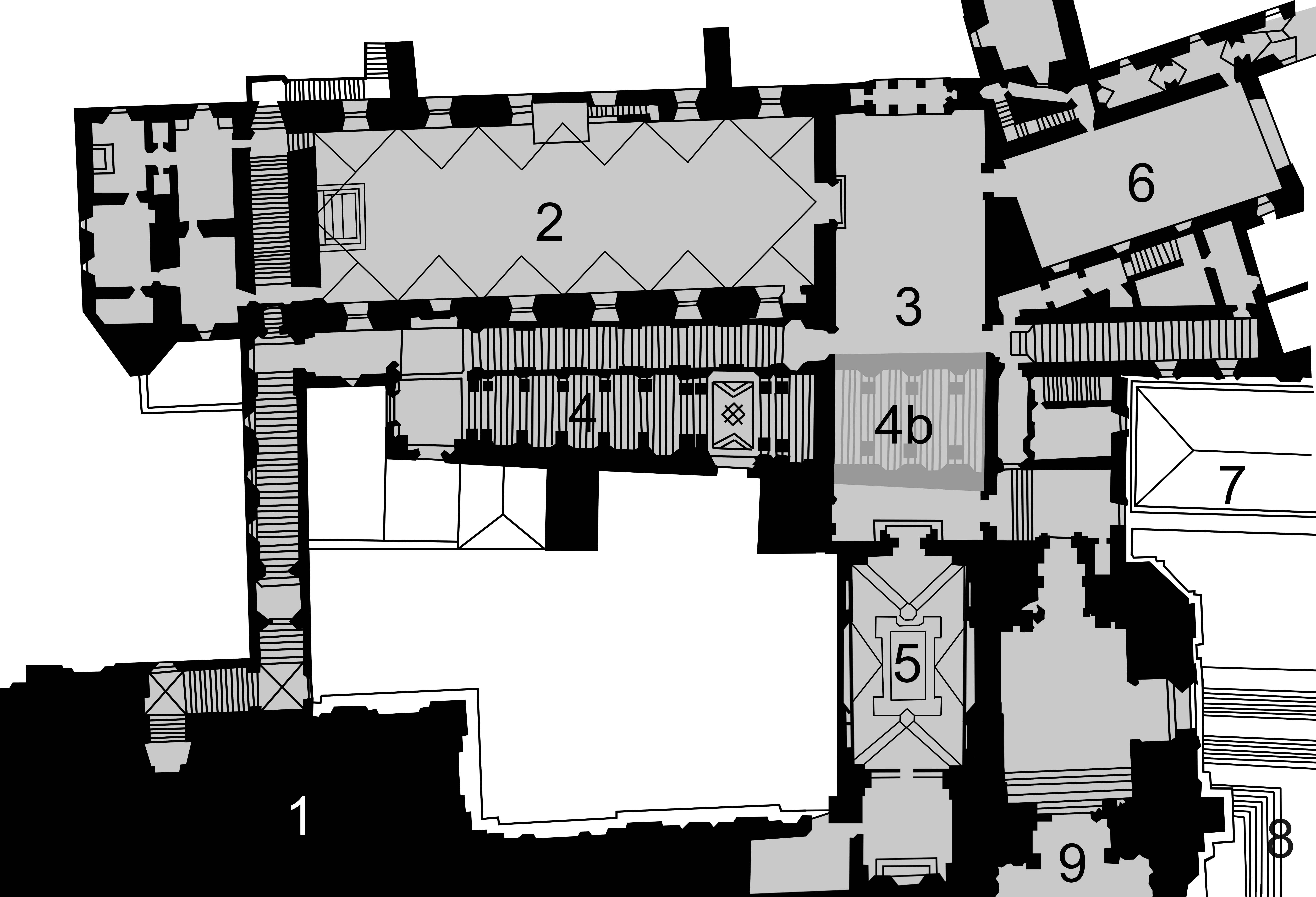 Grundriss der Sixtinischen Kapelle mit nebenliegenden Räumen: 1 Petersdom 2 Sixtinische Kapelle 3 Sala Regia (Königssaal) 4 Scala Regia 4b Scala Regia (Teil unterhalb der Sala Regia) 5 Cappella Paolina 6 Sala Ducale (Herzogssaal) 7 nördlicher Arm der Kolonnaden 8 Petersplatz 9 Benediktions-Aula (mit der Benediktionsloggia)